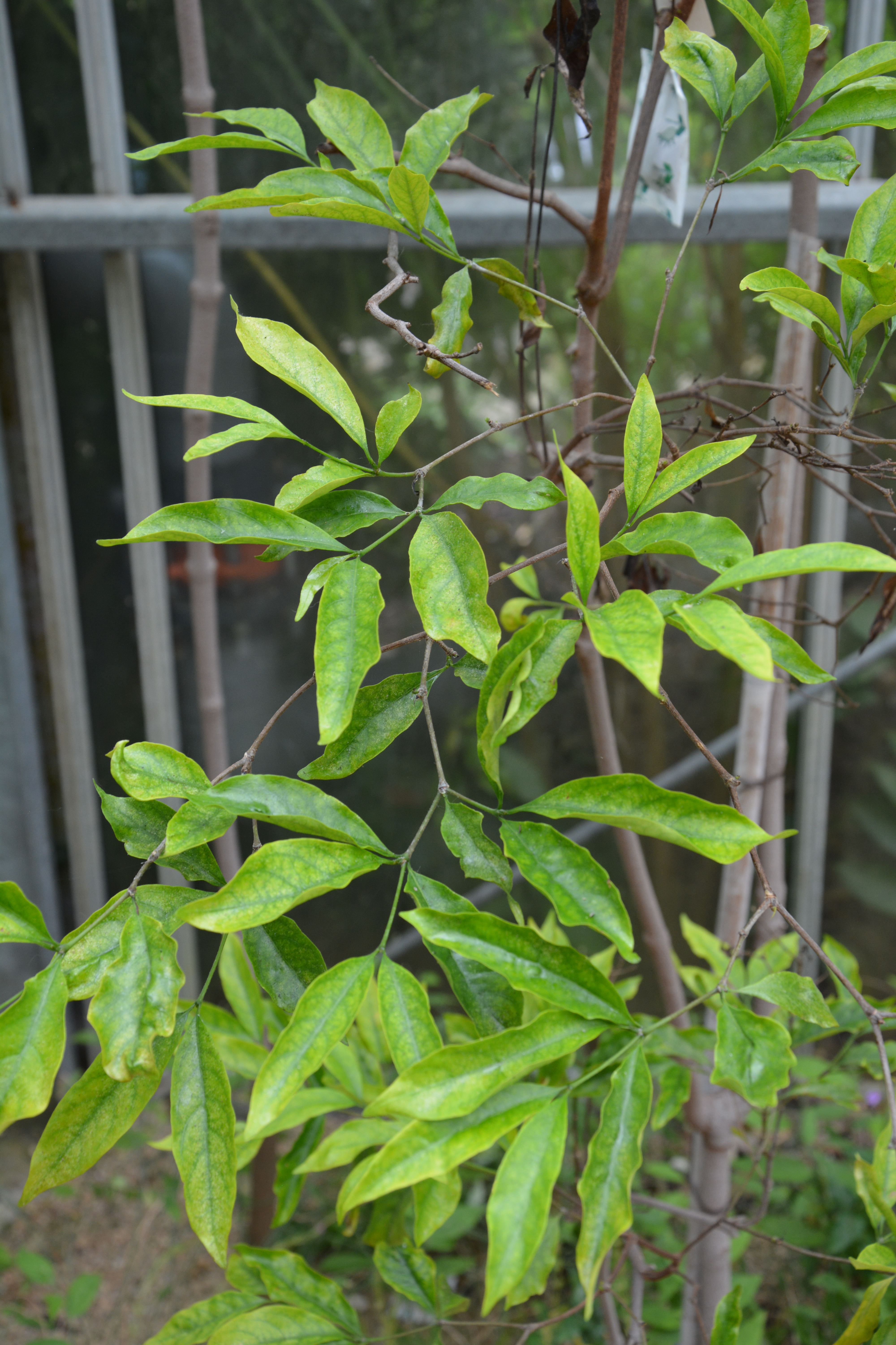 Rothmannia annae, photo prise au Conservatoire national de botanique de Brest à l'occasion du "Wiki takes Conservatoire Botanique National de Brest"